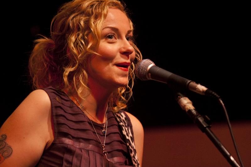 Anneke Van Giersbergen e Danny Cavanagh Live @ Blackmore Rock Bar - 05/06/2010 - São Paulo, Brasil É proibida a cópia ou reprodução deste material sem a autorização do autor. Por favor, não publique nada daqui sem o devido crédito. Fotógrafo: Alexandre Cardoso